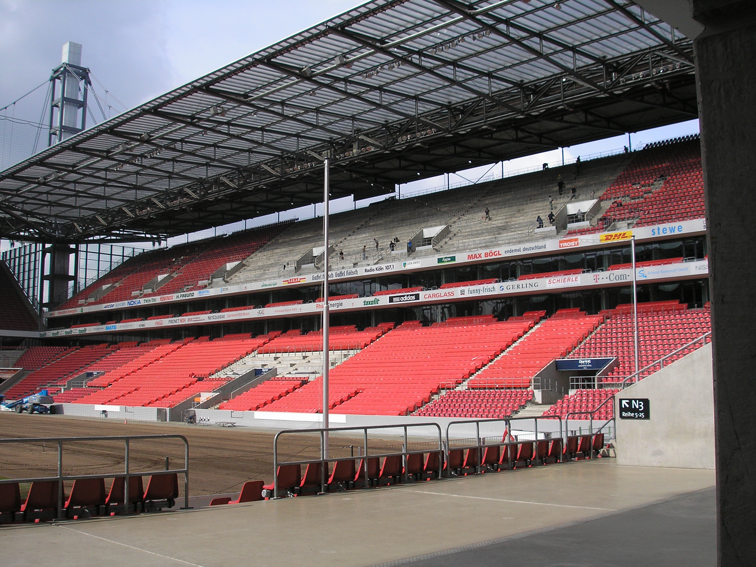 Das Stadion wird zur WM umgebaut.